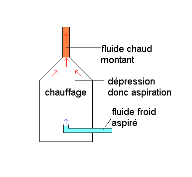 Ce fichier explique le phénomène de thermonaspiration.